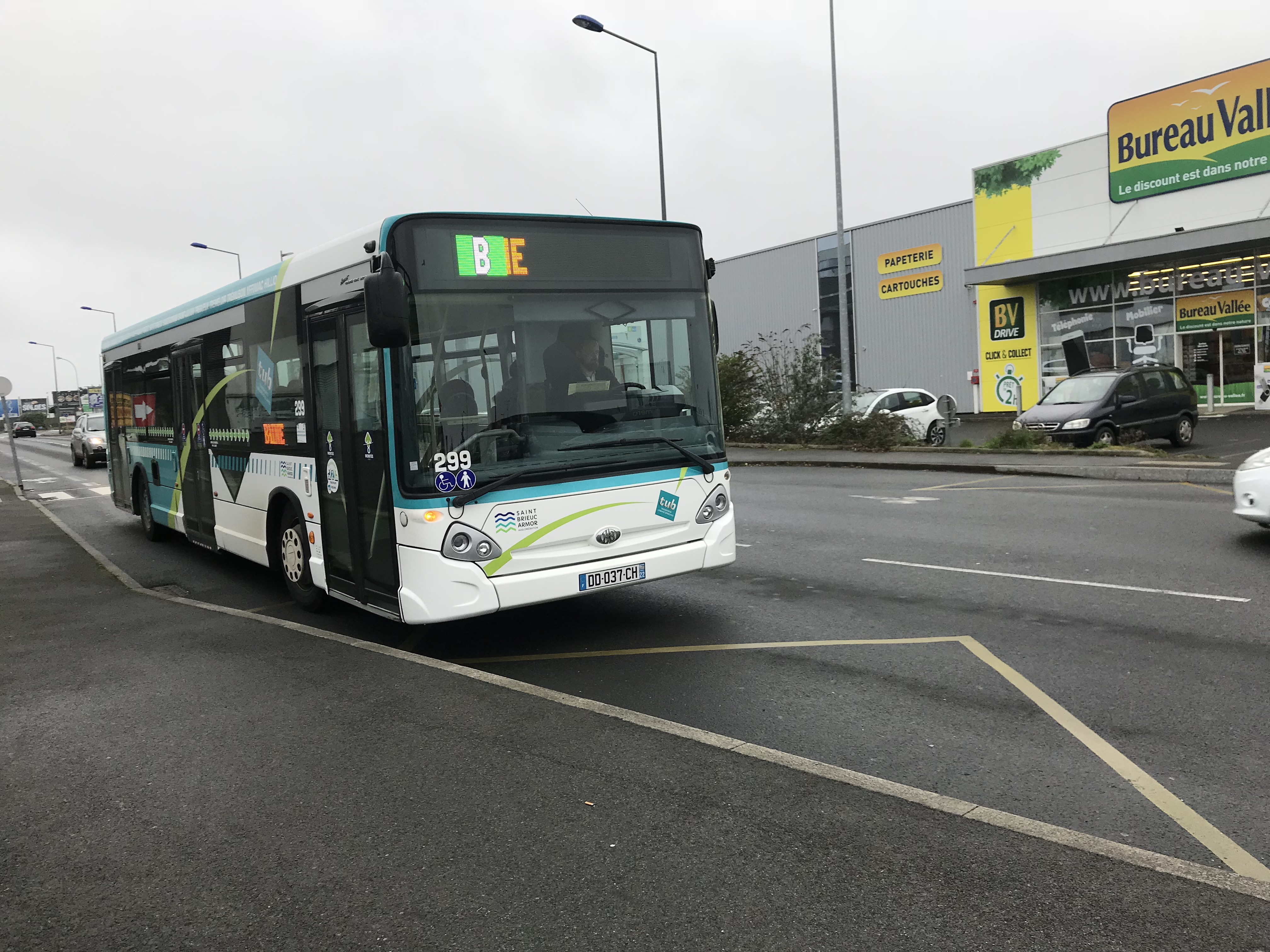 Un bus à Saint-Brieuc